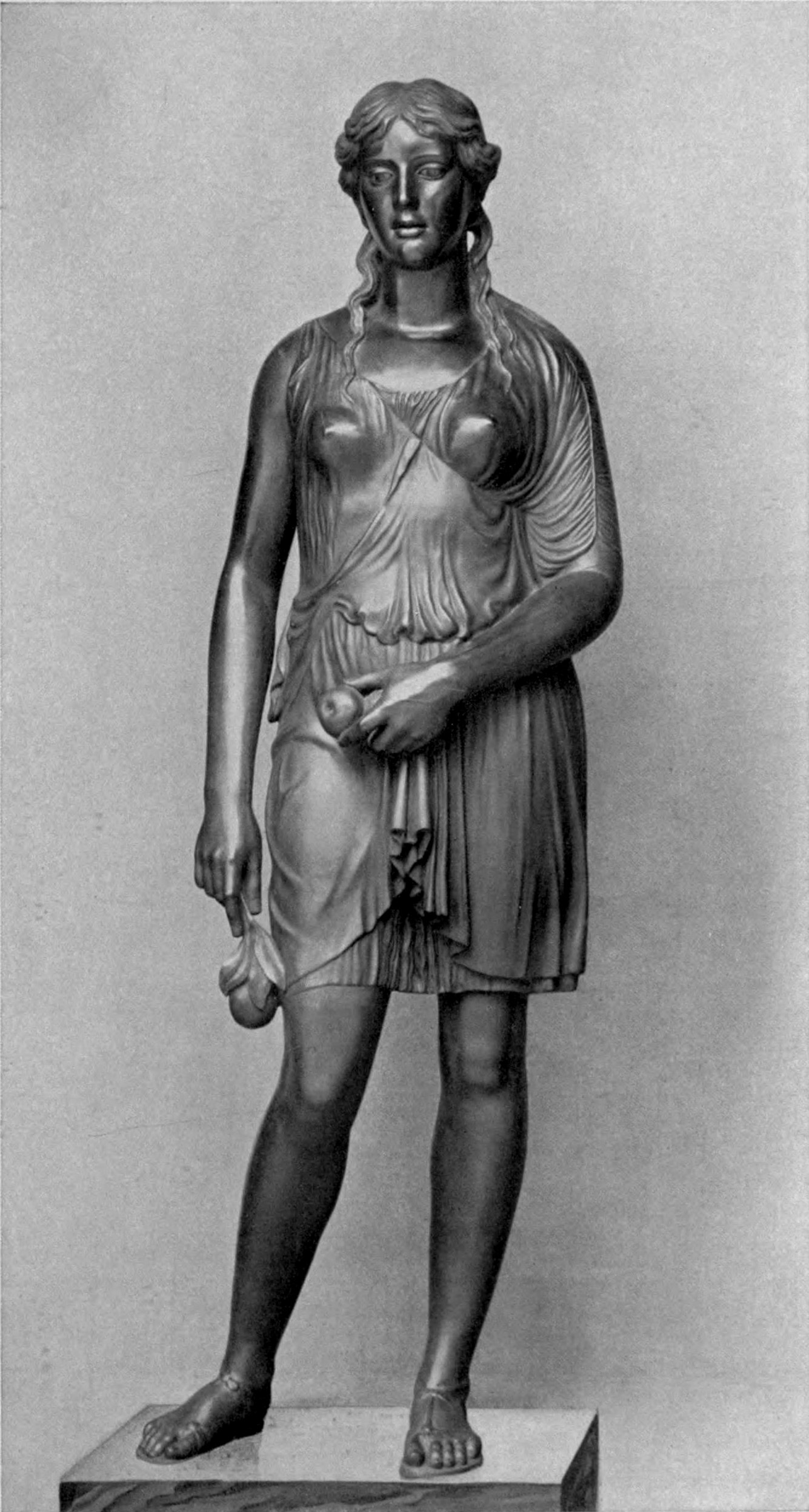 Atalanta